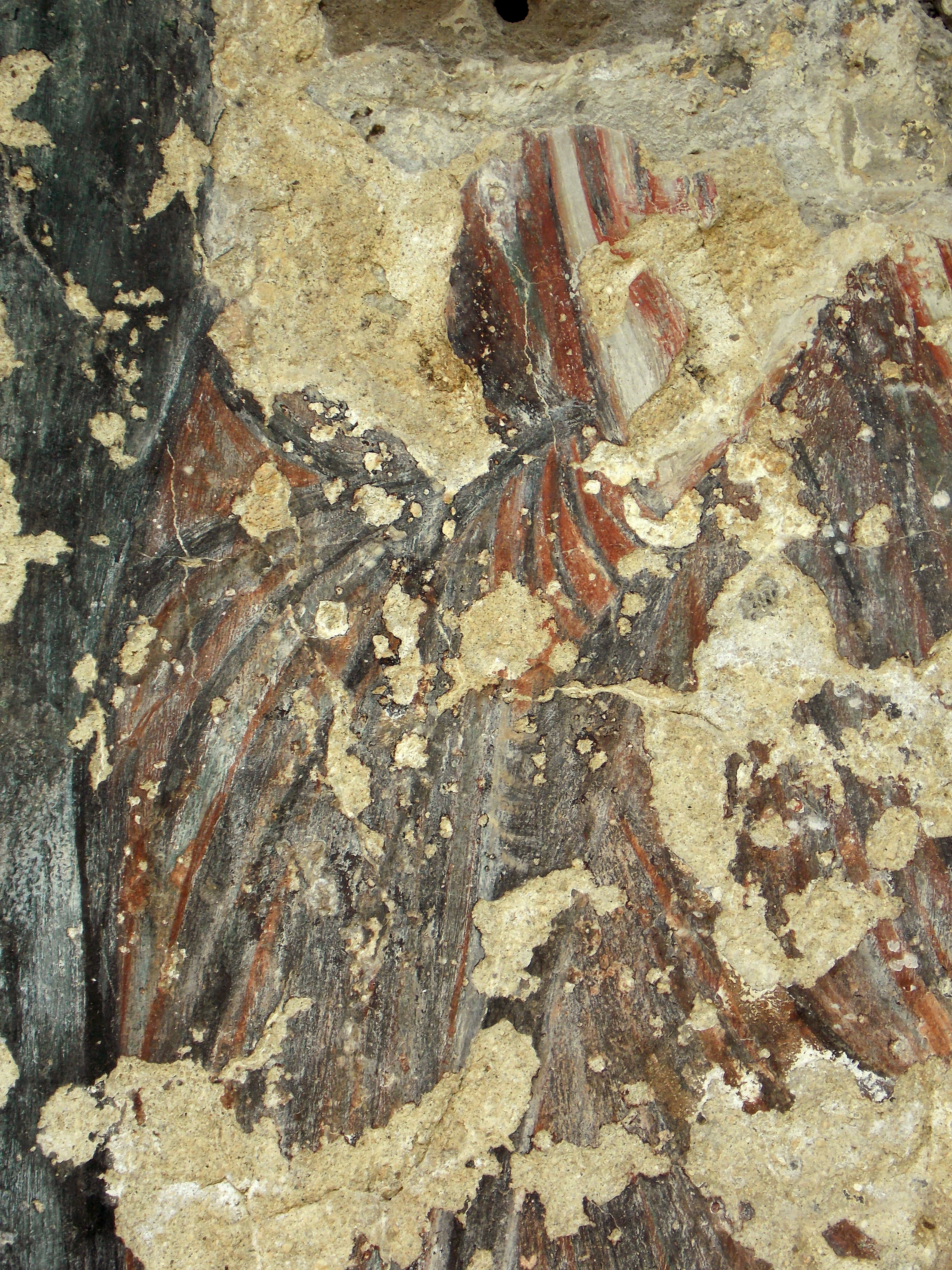 I ruderi dell'abside dell'oratorio di San Giorgio a Faicchio (BN) con gli affreschi, dipinti fra il X e il XV secolo